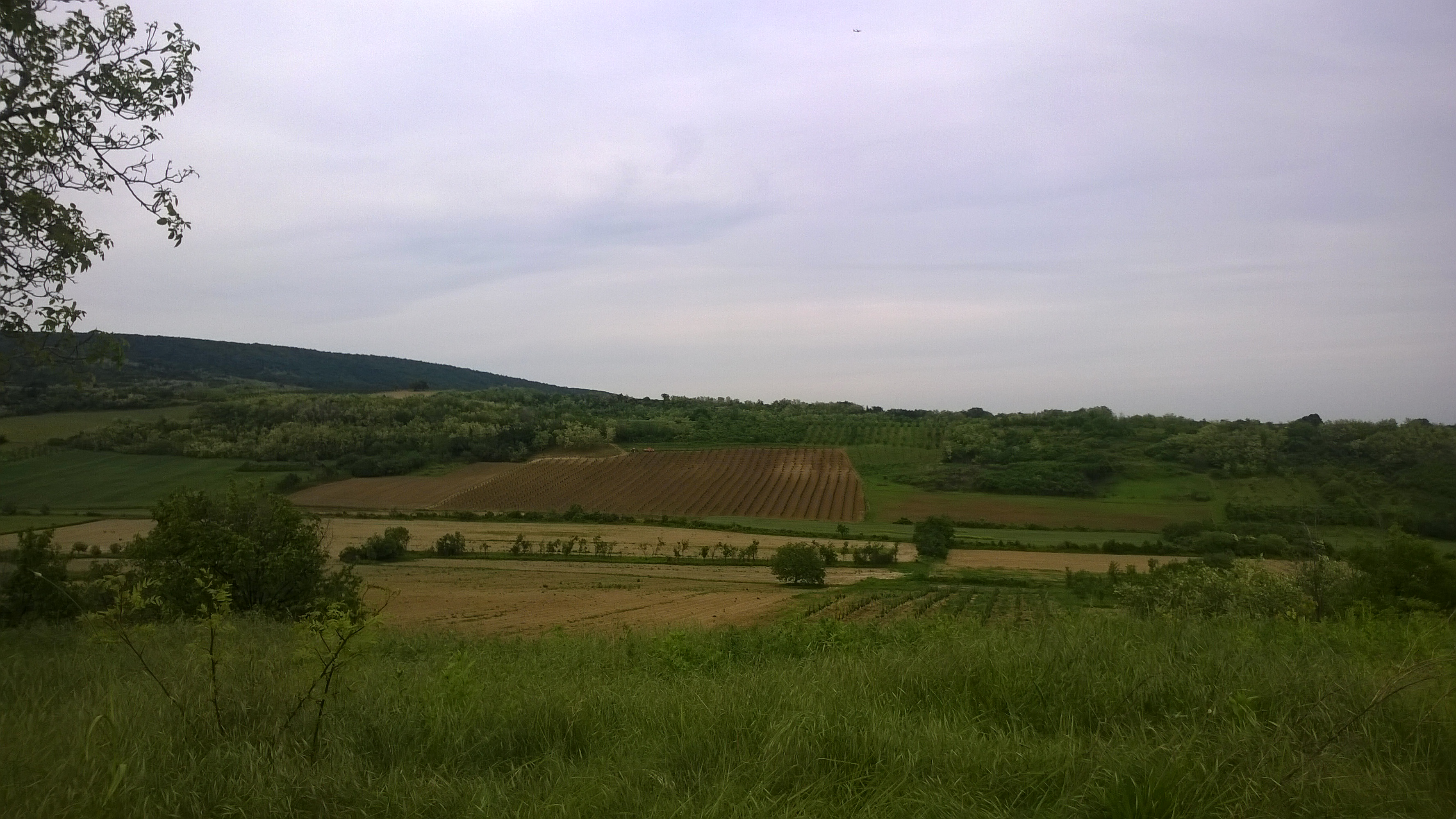 Irig, Serbia